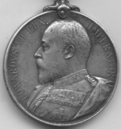 Ashanti Medal 1900 obverse